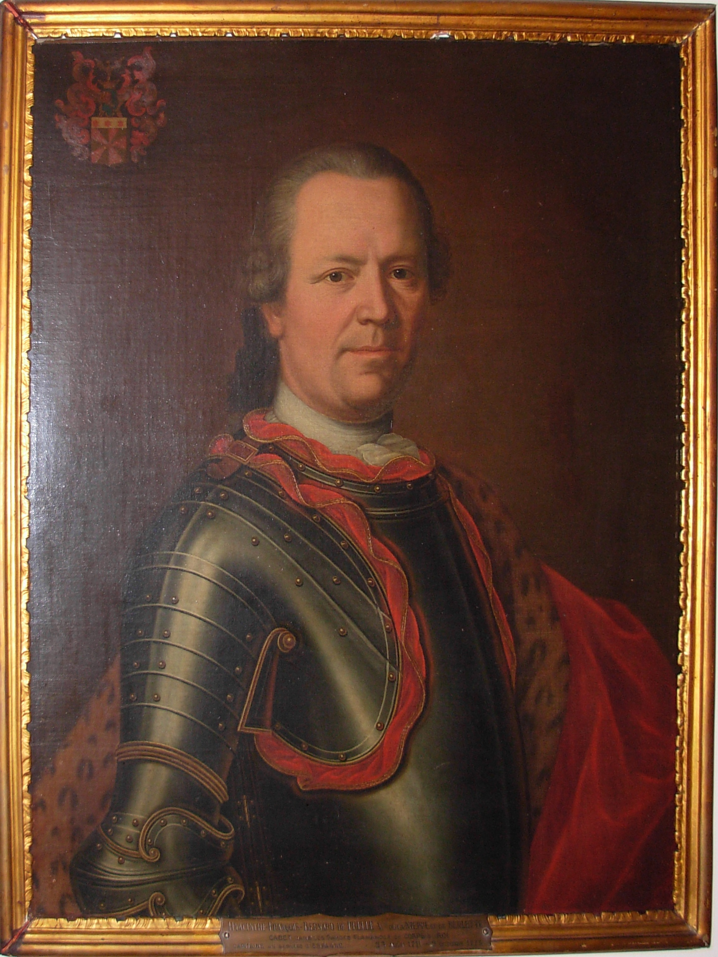 Portrait de Hyacinthe de Prelle (1711–1773)